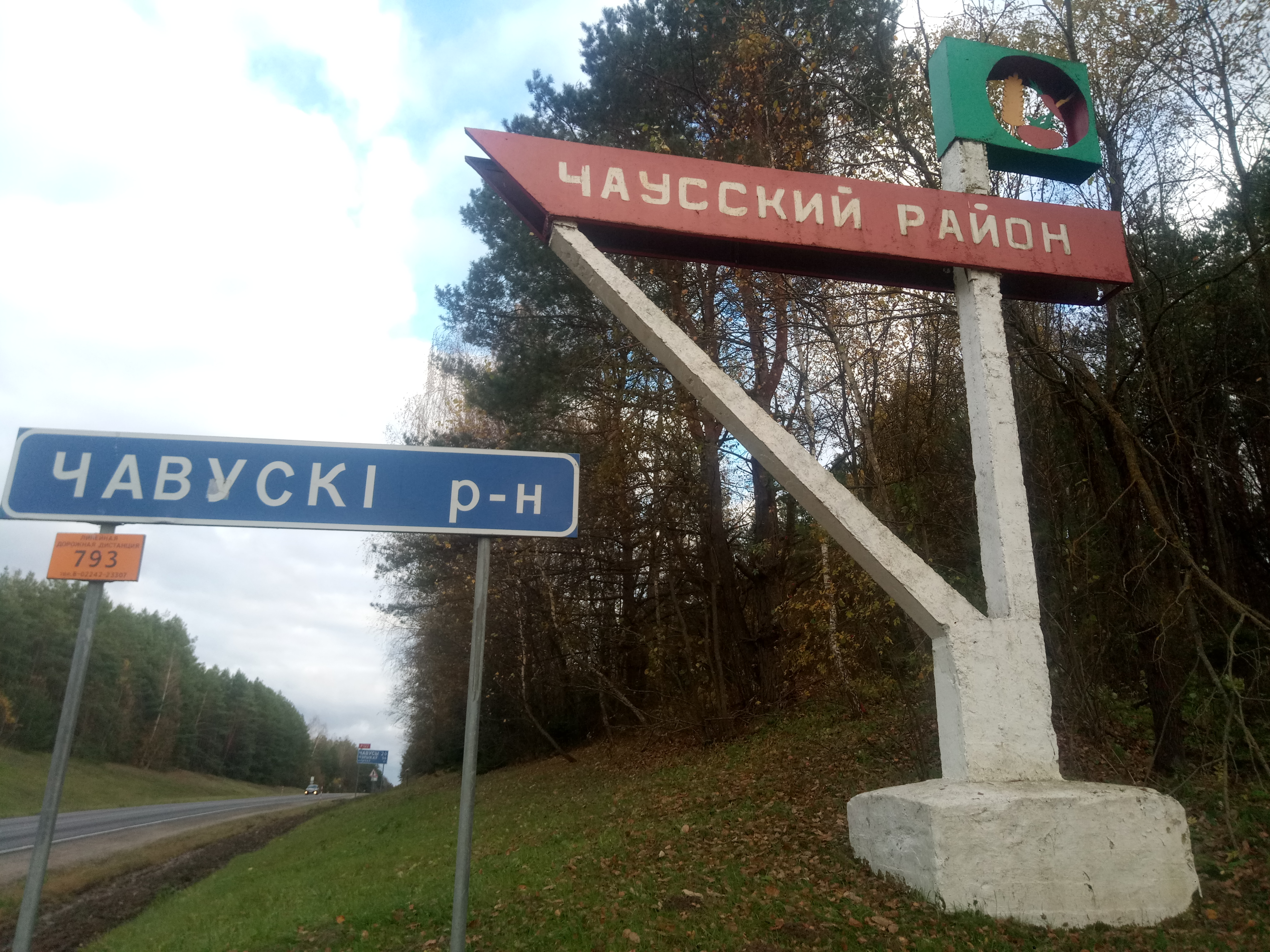 Чаусский район